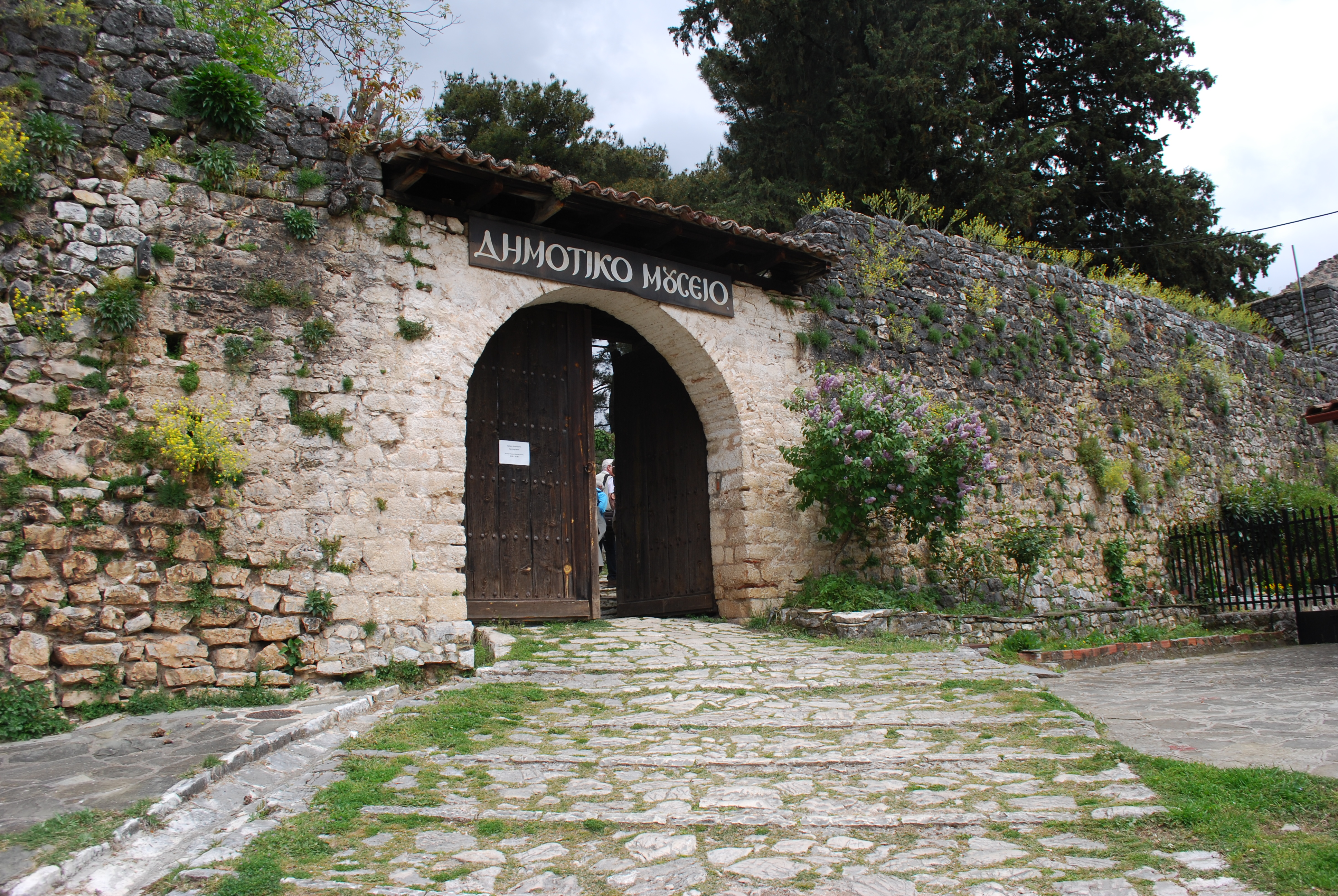 Vue de Ioannina.